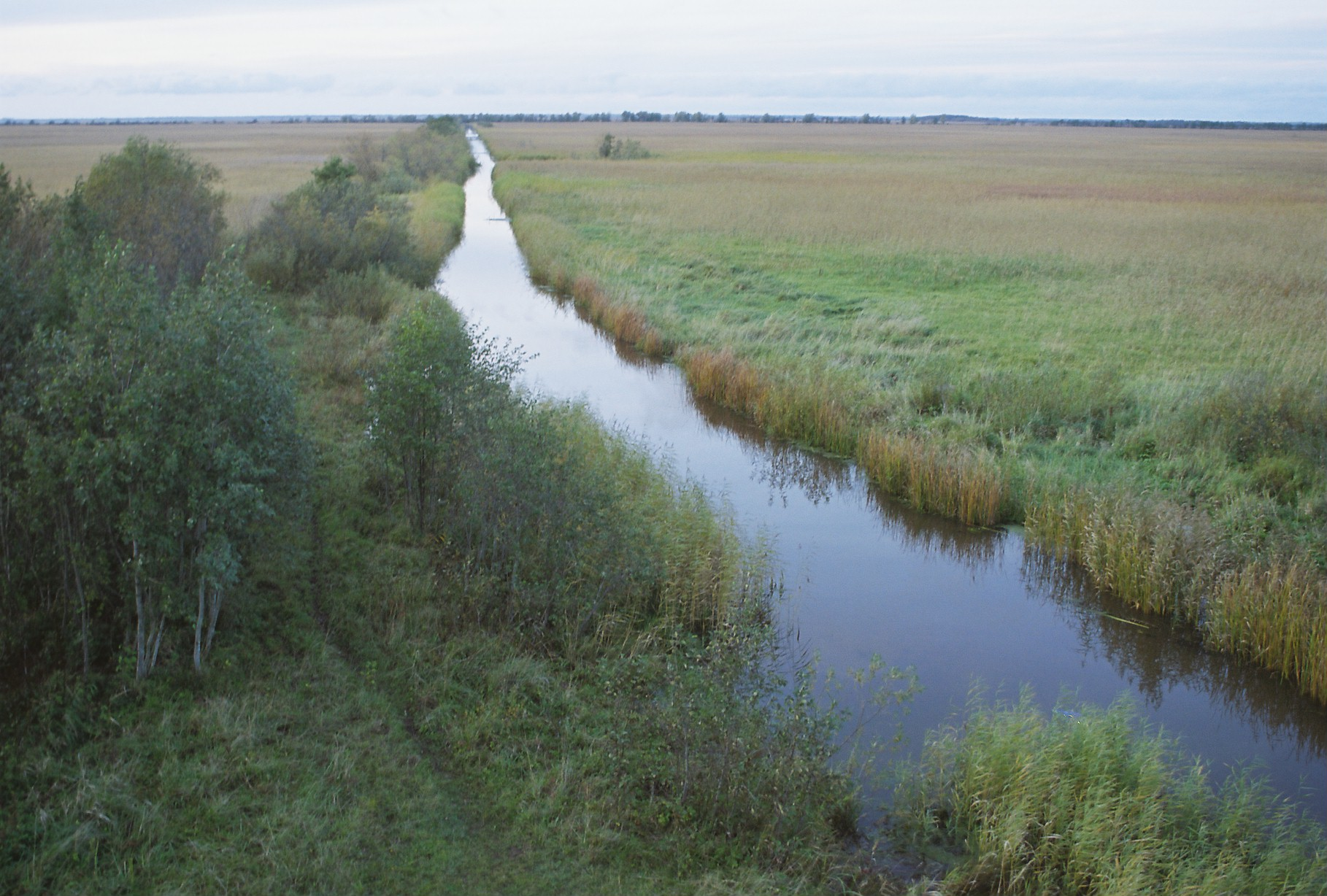 Penijõgi